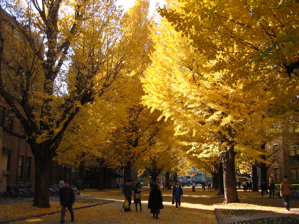 東京大學校園 冬季銀杏 photo by hibaby